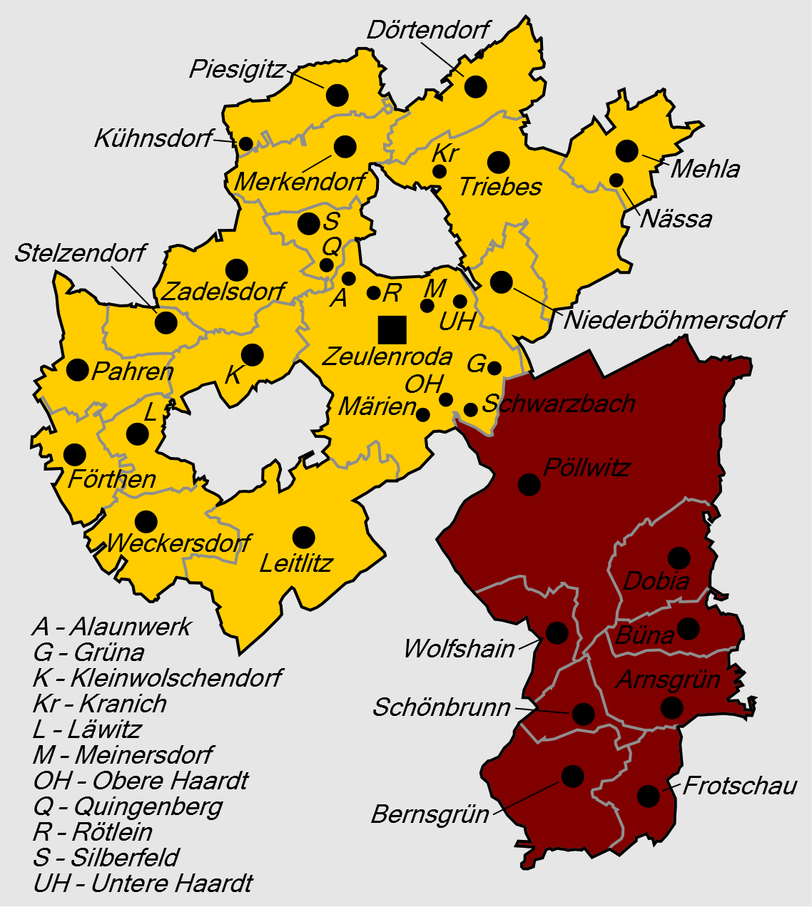 Gliederung der Stadt Zeulenroda-Triebes ab 1. Dezember 2011